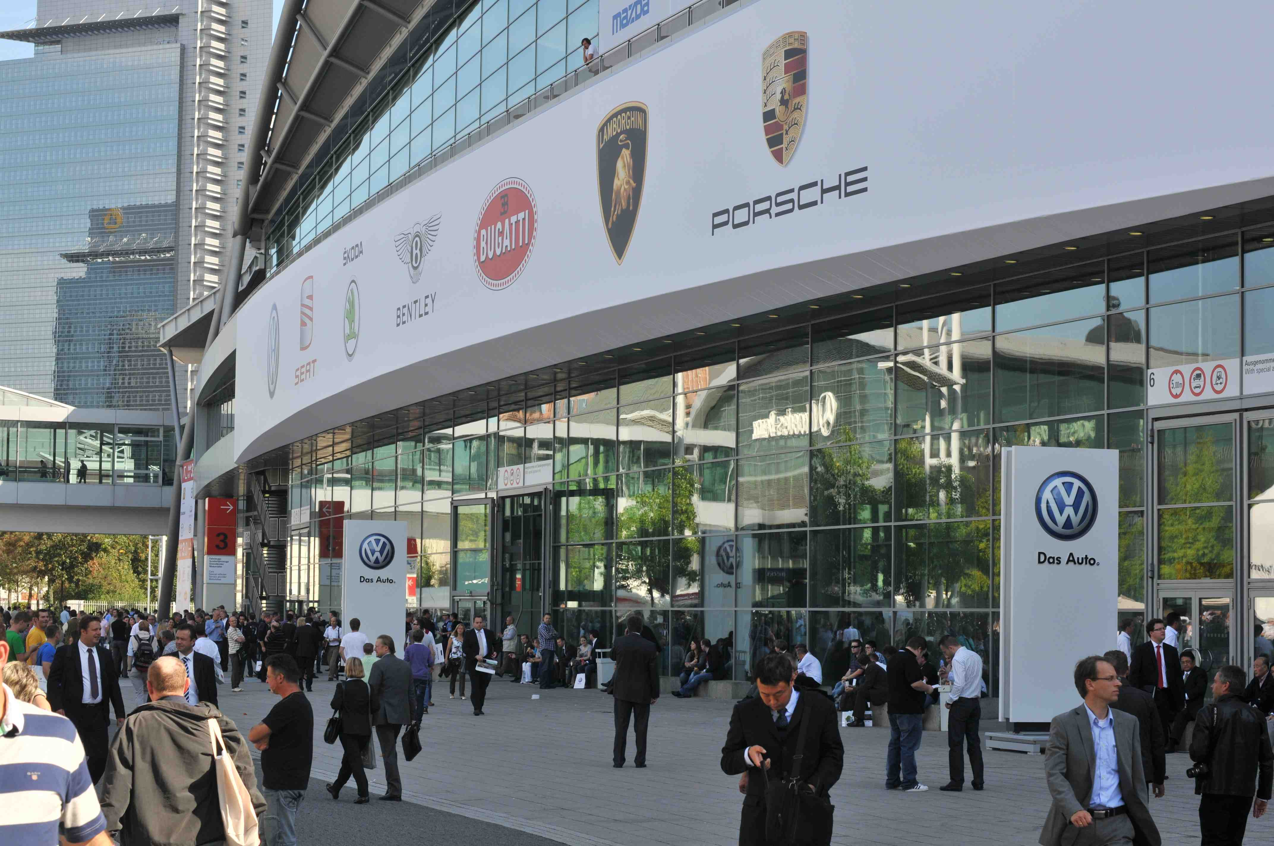 IAA 2011 - Internationale Automobilausstellung in Frankfurt/Main